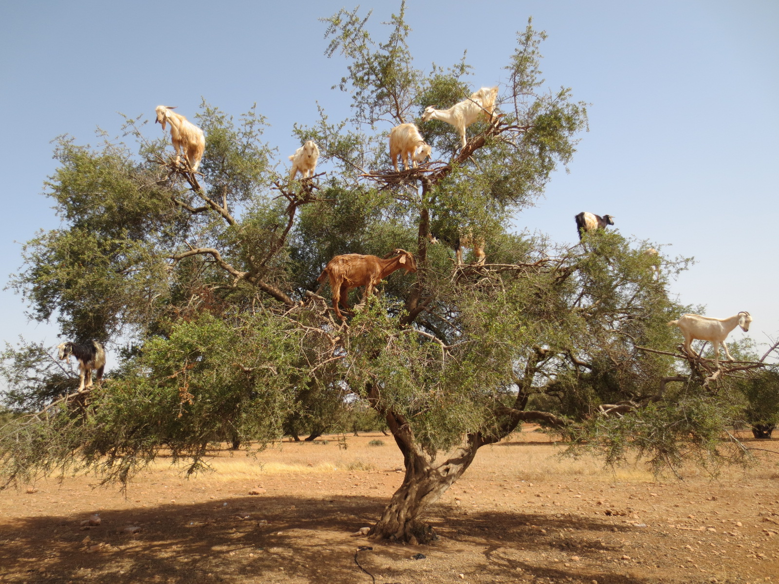 Arganier et chèvres entre Marrakech et l'Atlas au Maroc